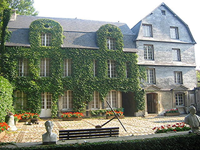 Musée du Vieux Havre, l'une des plus vieille maison du Havre, XVIIe et XVIIIe siècles.